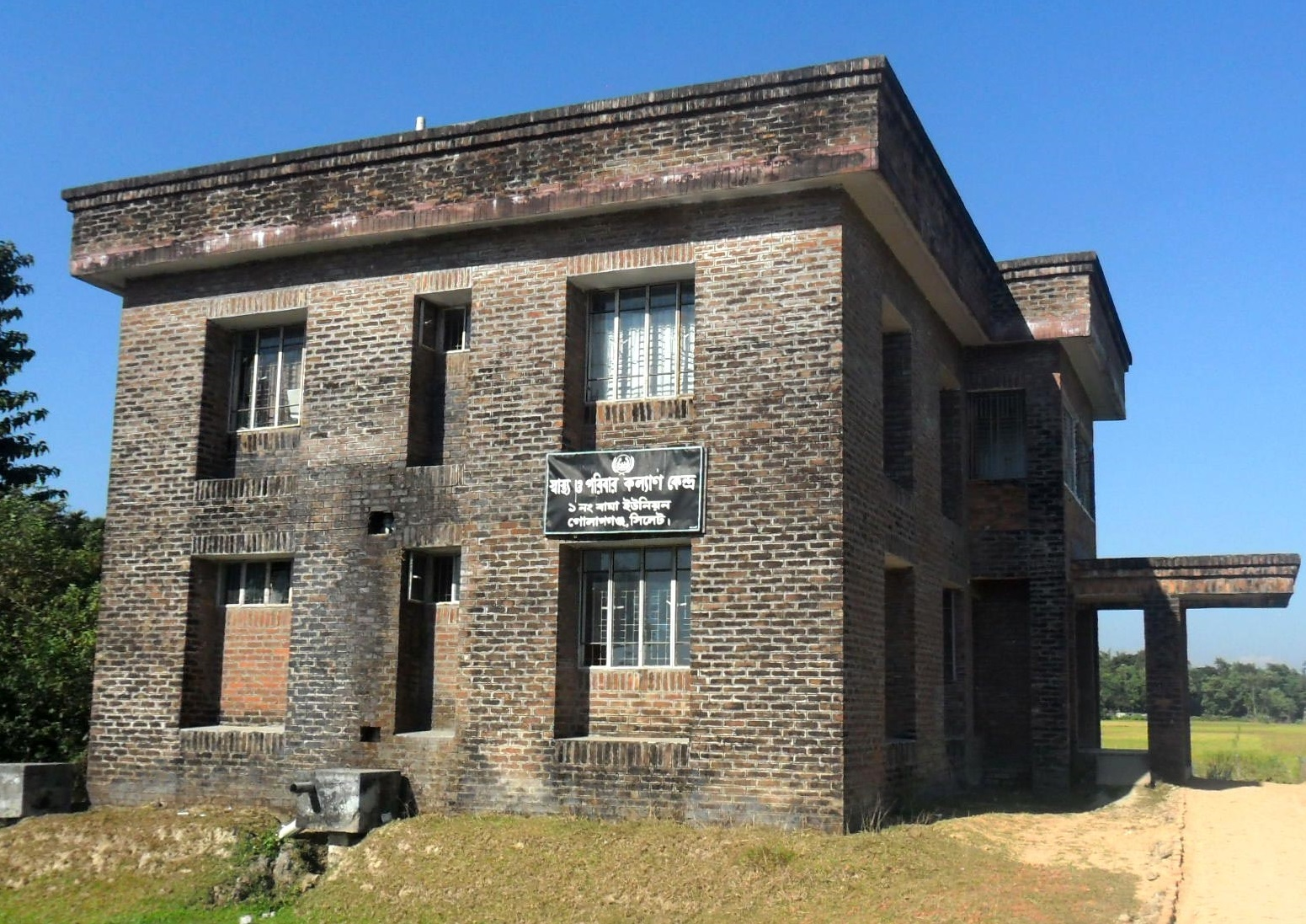 বাঘা ইউনিয়ন স্বাস্থ্য কমপ্লেক্স